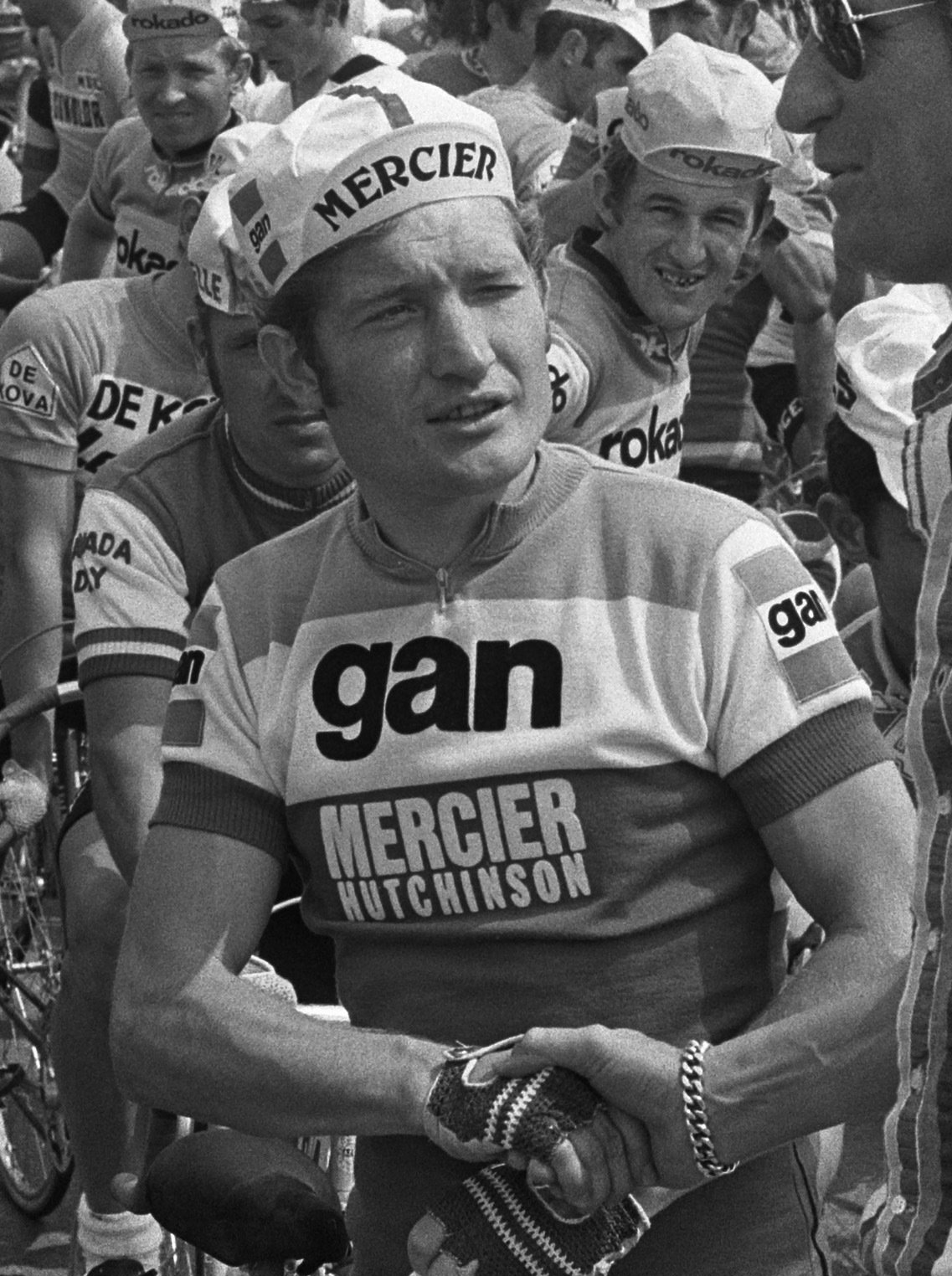 Finish eerste etappe Tour de France, Scheveningen naar Rotterdam. Cyrille Guimard in gesprek met Peter Post.